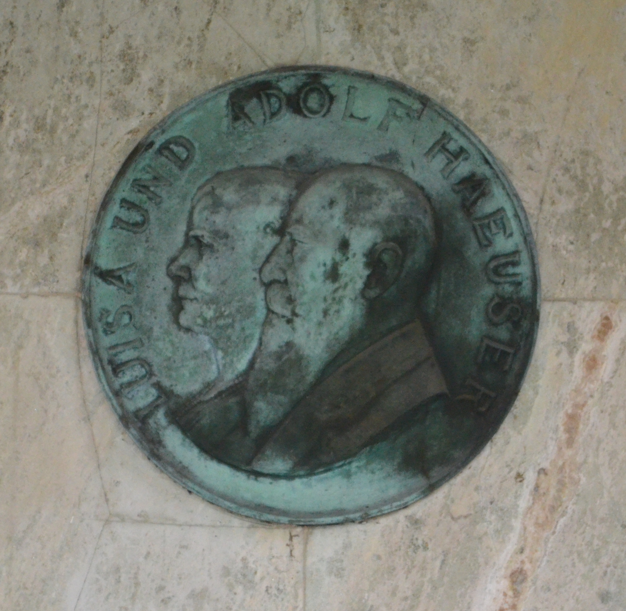 Frankfurt, Hauptfriedhof, Grab II 192 Haeuser